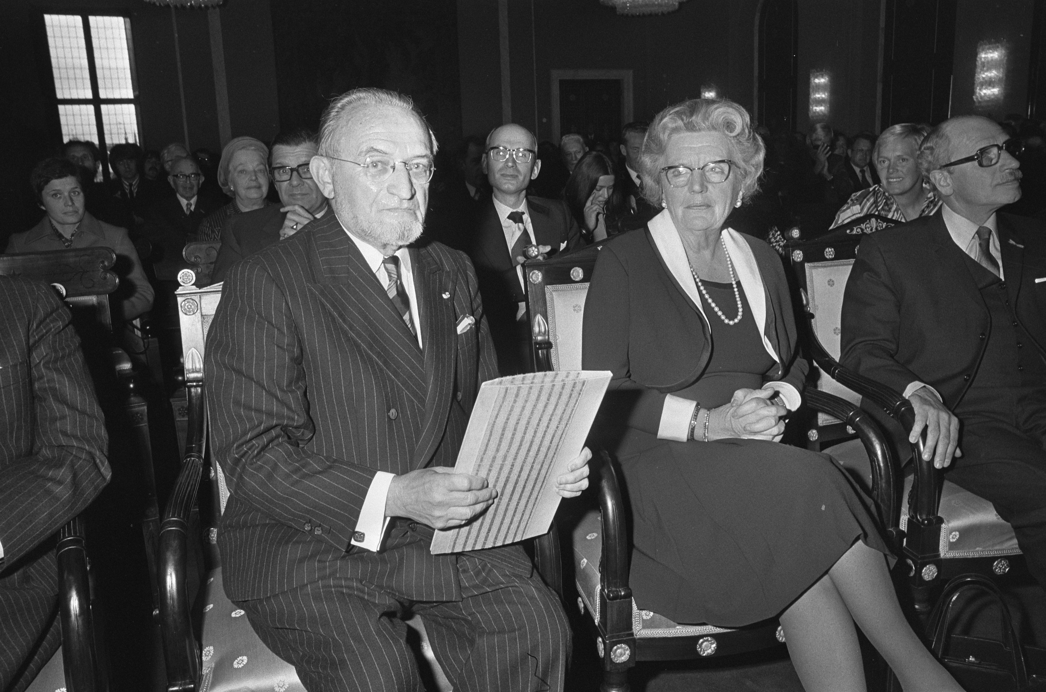 Belgische schrijver Marnix Gijsen (1899-1984) op 5 oktober 1974 tijdens de uitreiking van de Prijs der Nederlandse letteren. Midden: koningin Juliana van Nederland, rechts minister Harry van Doorn